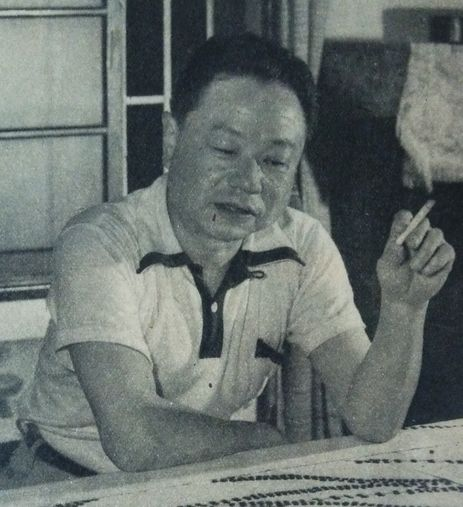 林髞